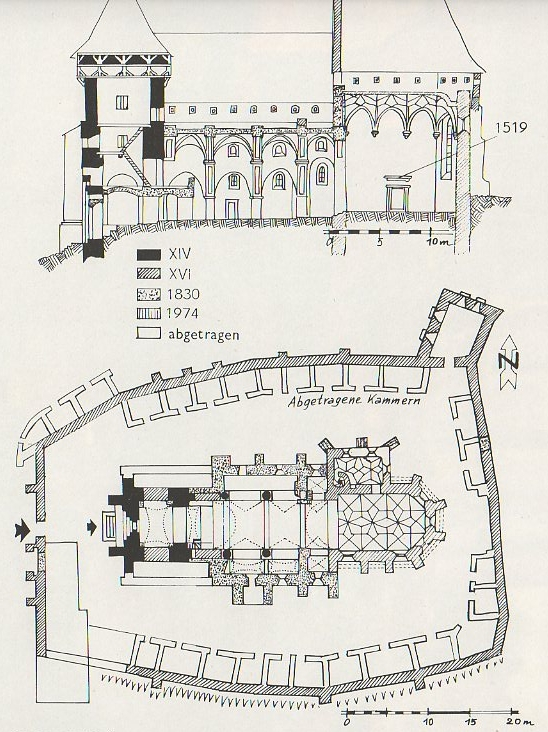 Planul fortificatiei din Copsa Mare.